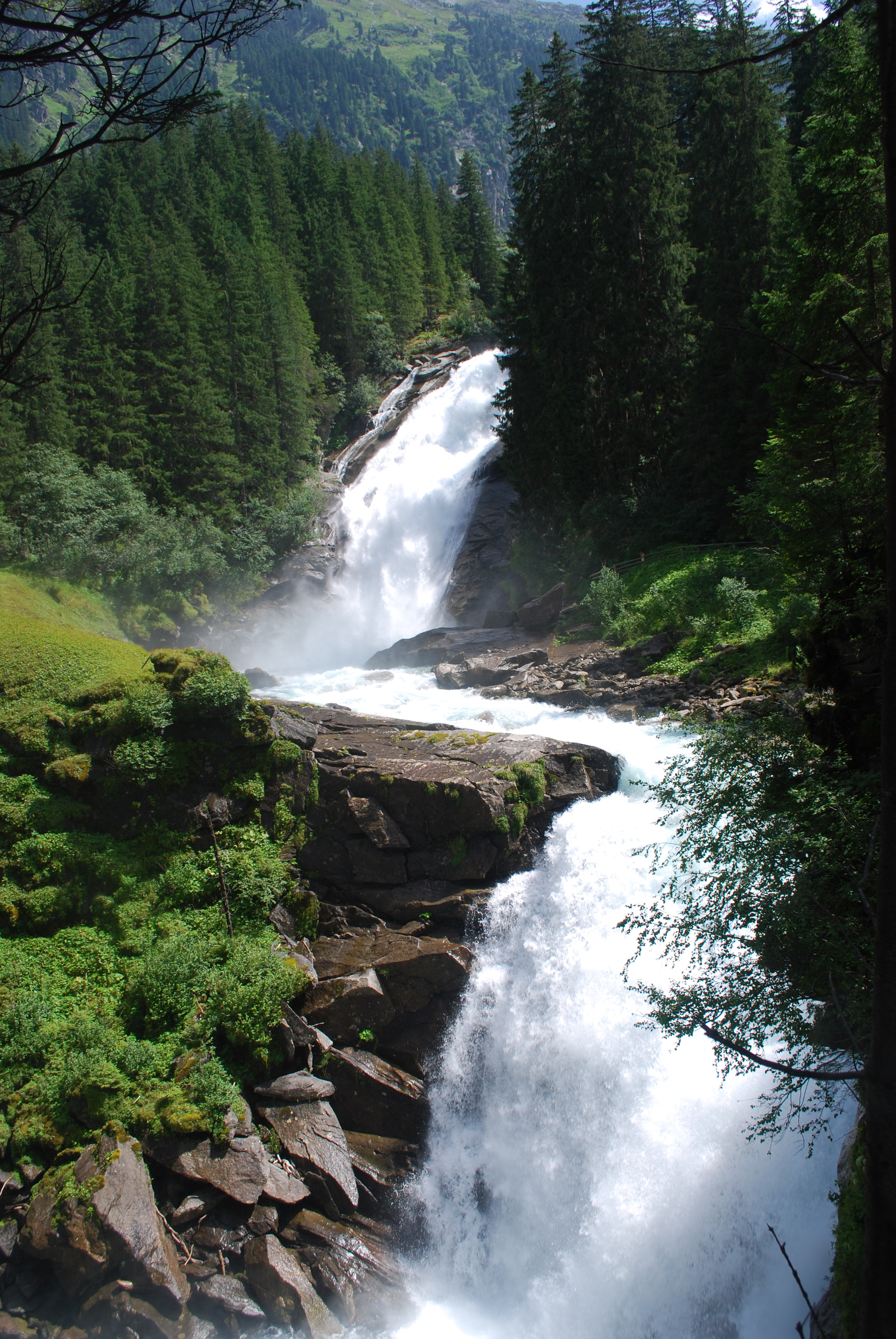 Krimmler Wasserfälle, Krimml Oostenrijk